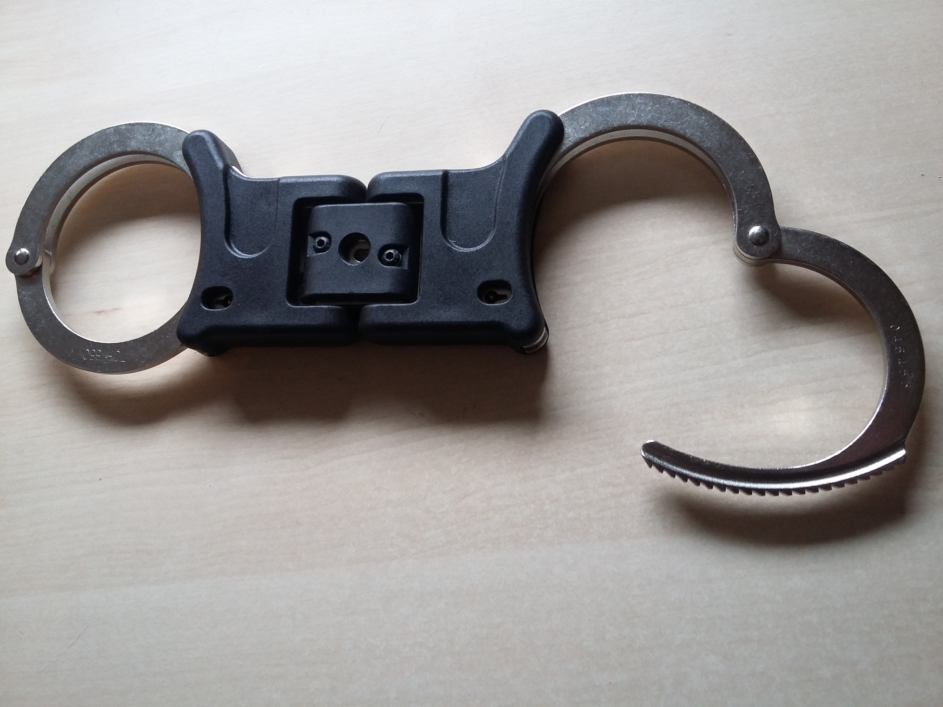 Lisice z zaklenjivim kovinskim tečajem proizvajalca TCH UK, katere uporablja tudi slovenska policija